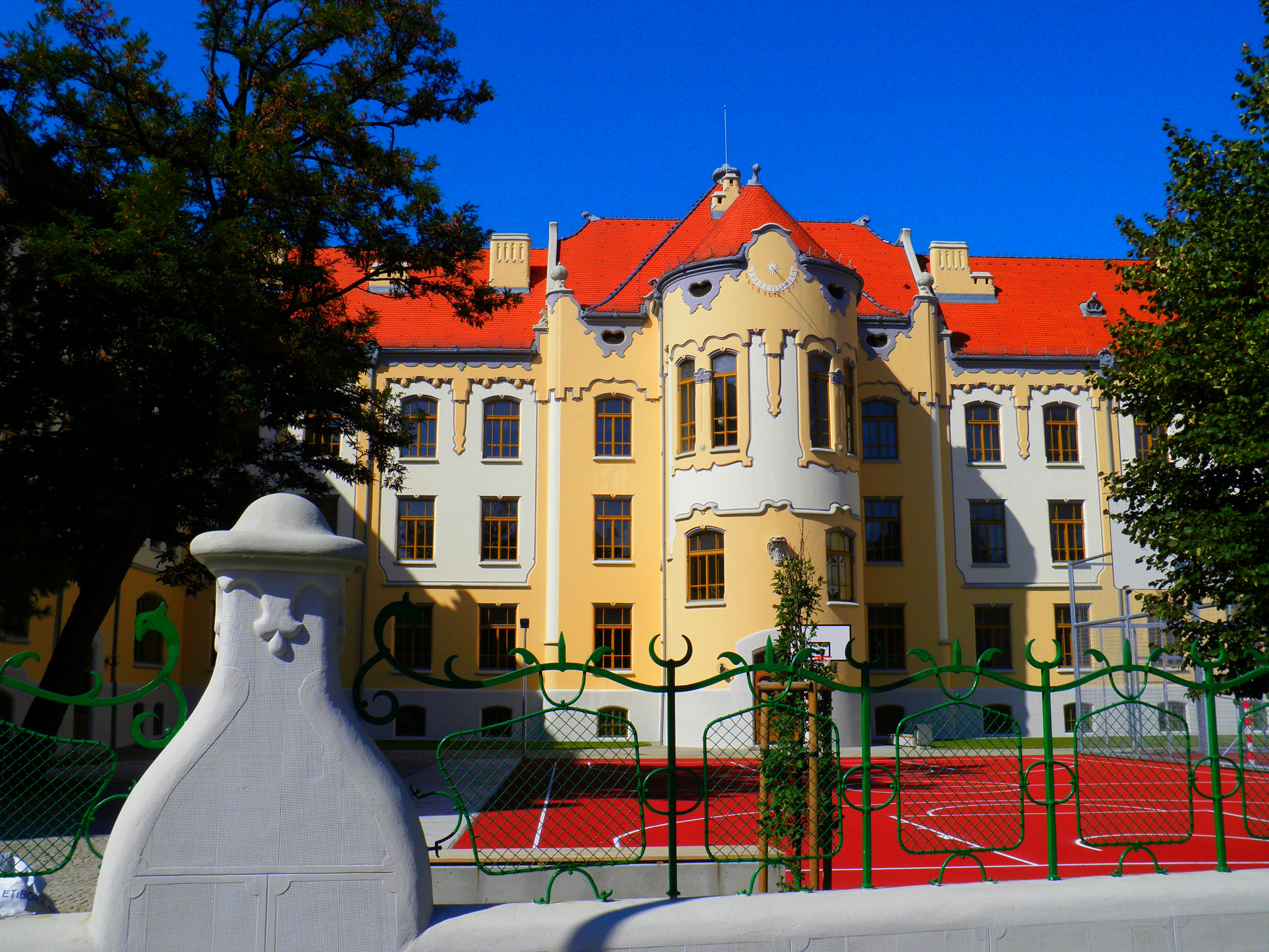 Gimnazija u Grosslingovoj ulici